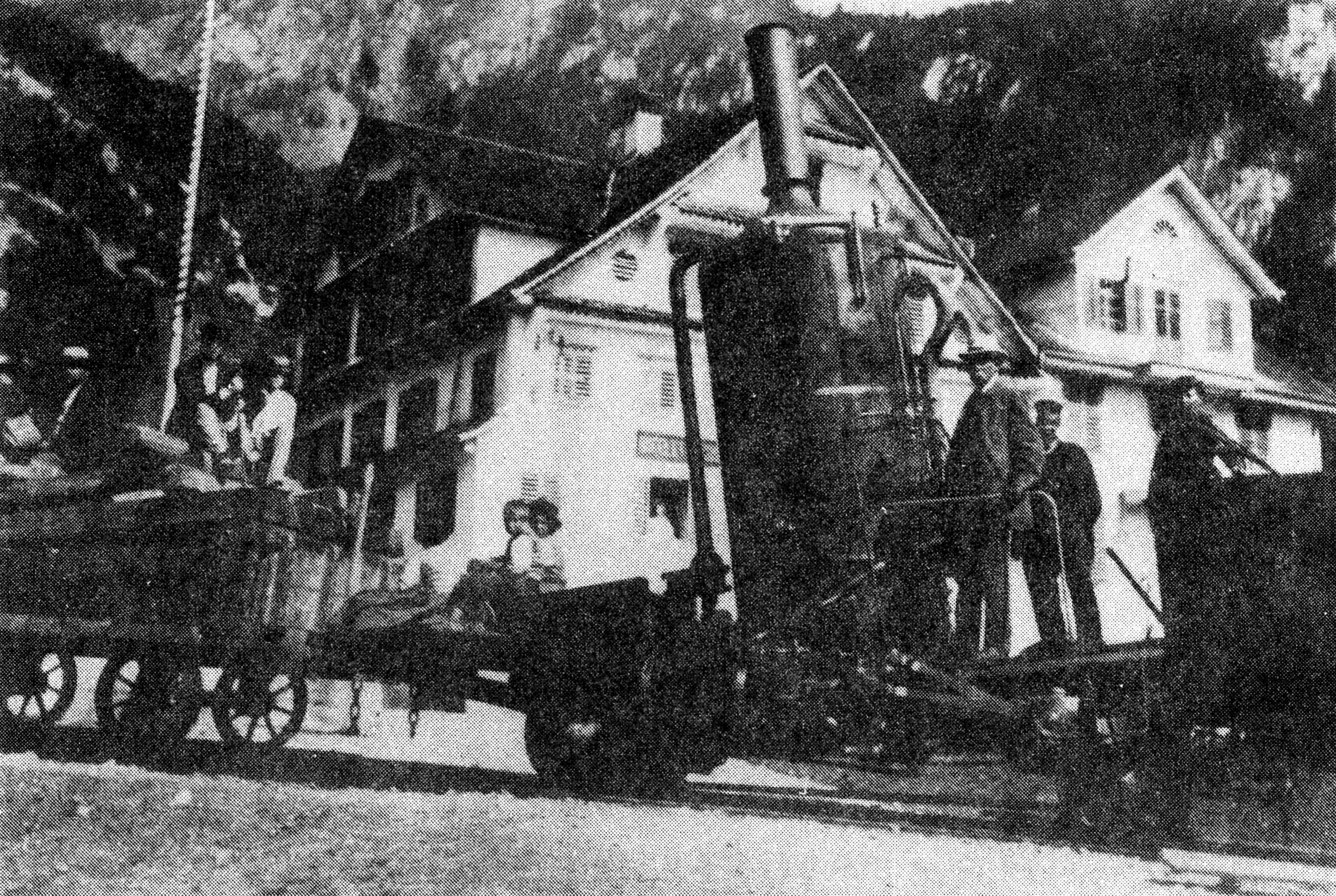 Ferdinand Adolf Naeff auf der ersten Lokomotive der Rigi-Bahn